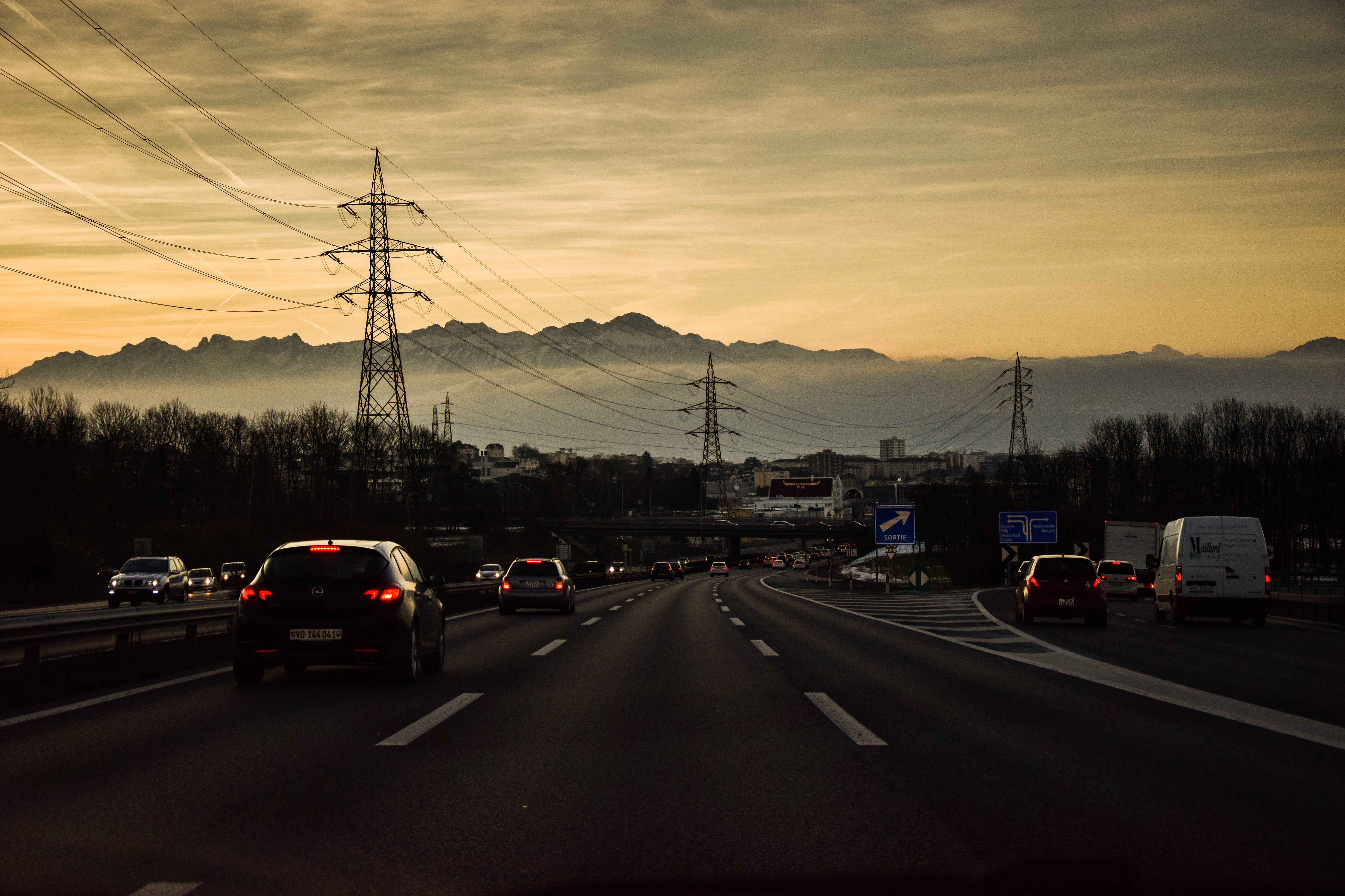 Les alpes suisses vu depuis l'autoroute de Lausanne.